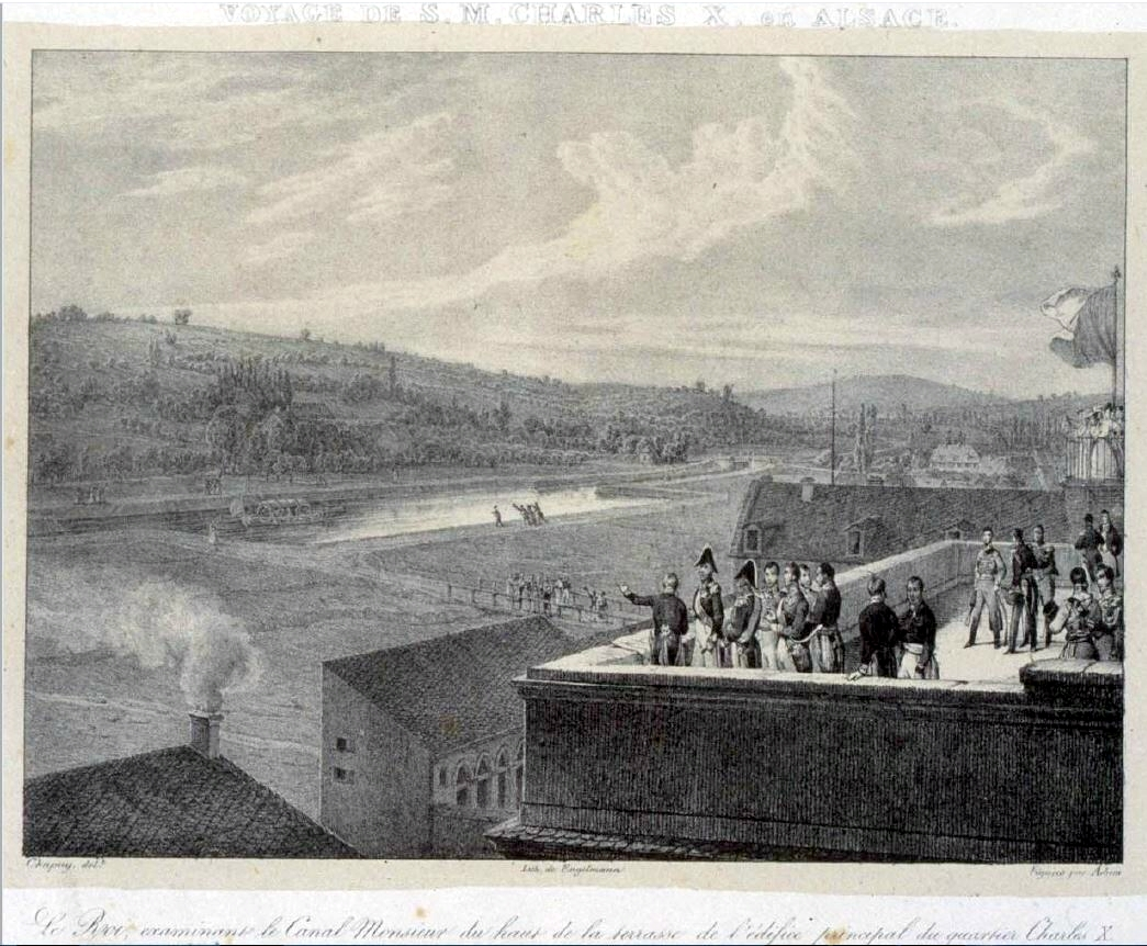 Le Roi examinant le Canal Monsieur du haut de la terrasse de l'édifice principal du quartier Charles X à Mulhouse.